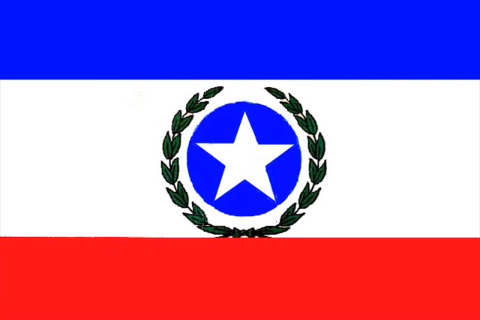 Bandeira do Município de Campina da Lagoa